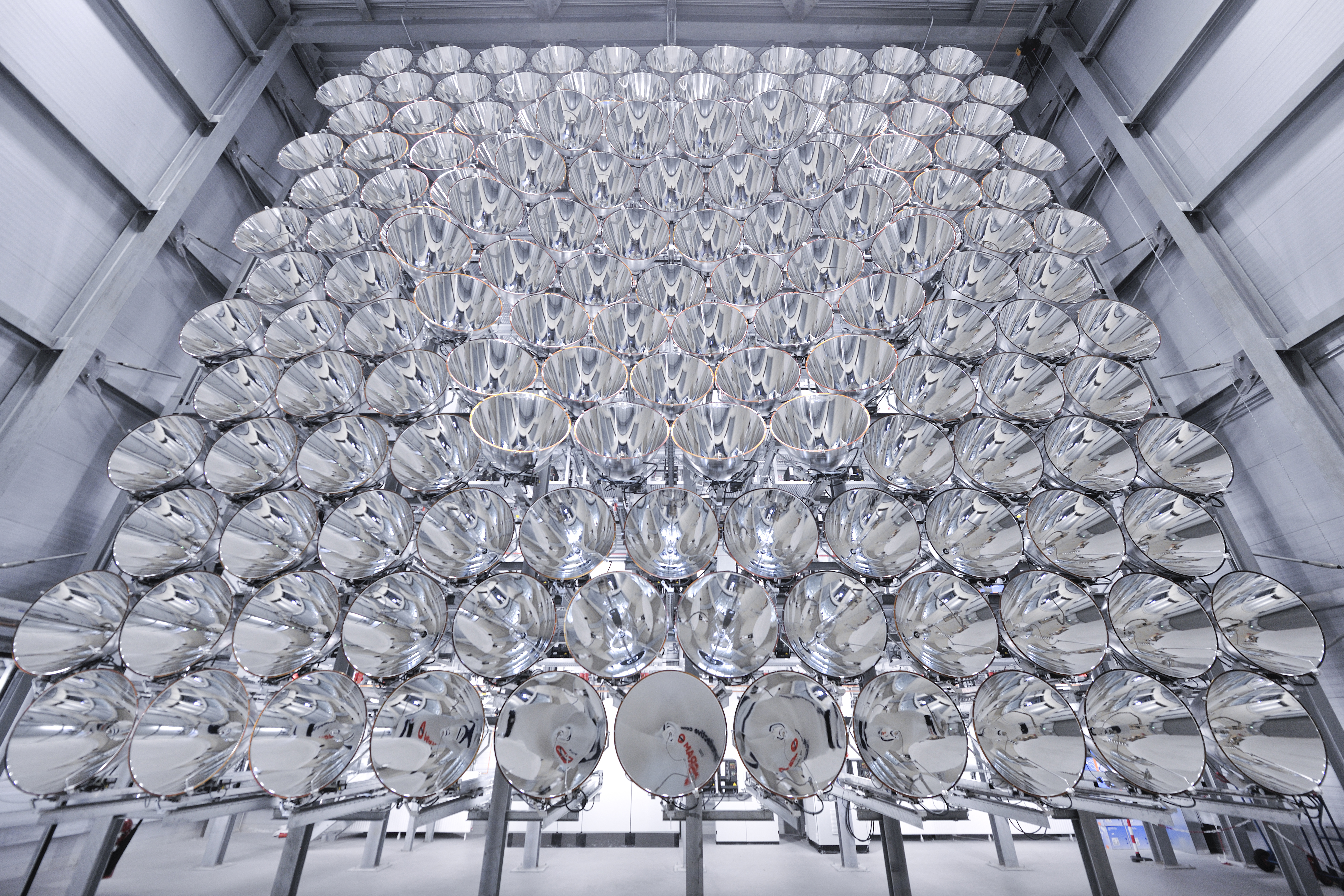 Synlight